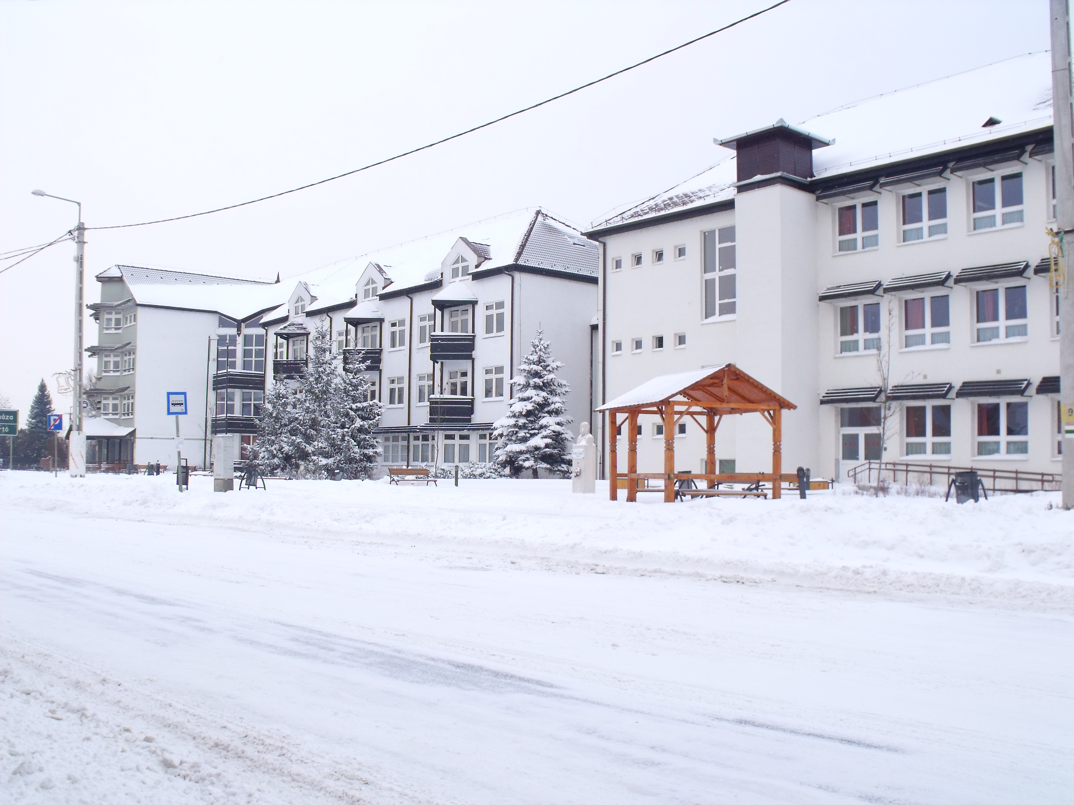 A Korányi Frigyes Gimnázium főépülete, a kollégium és a Korányi park télen (Nagykálló)